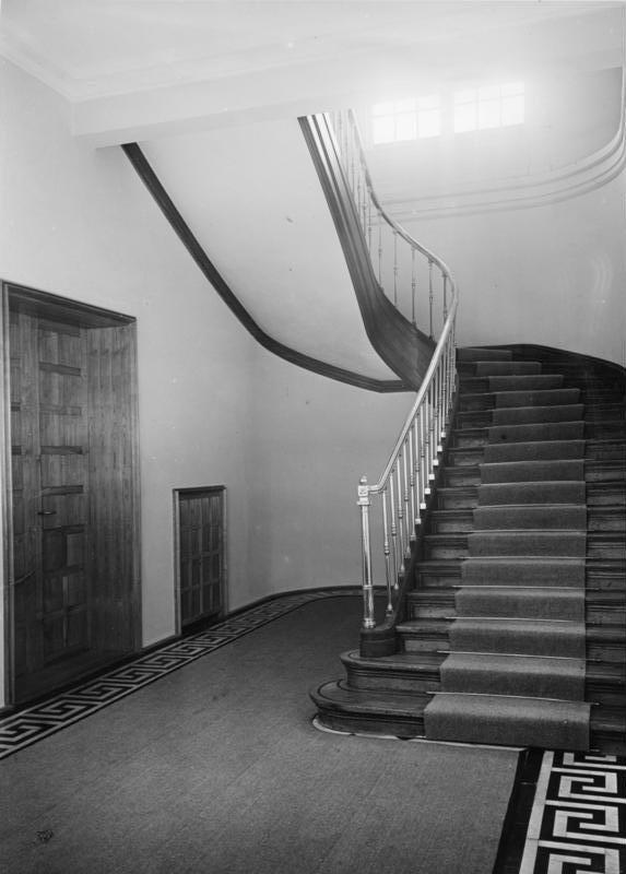 Haus des Bundeskanzlers (Palais Schaumburg), Bonn, Koblenzer Straße. Klassizistisches Treppenhaus mit Messinggeländer, um 1860, im Altbau